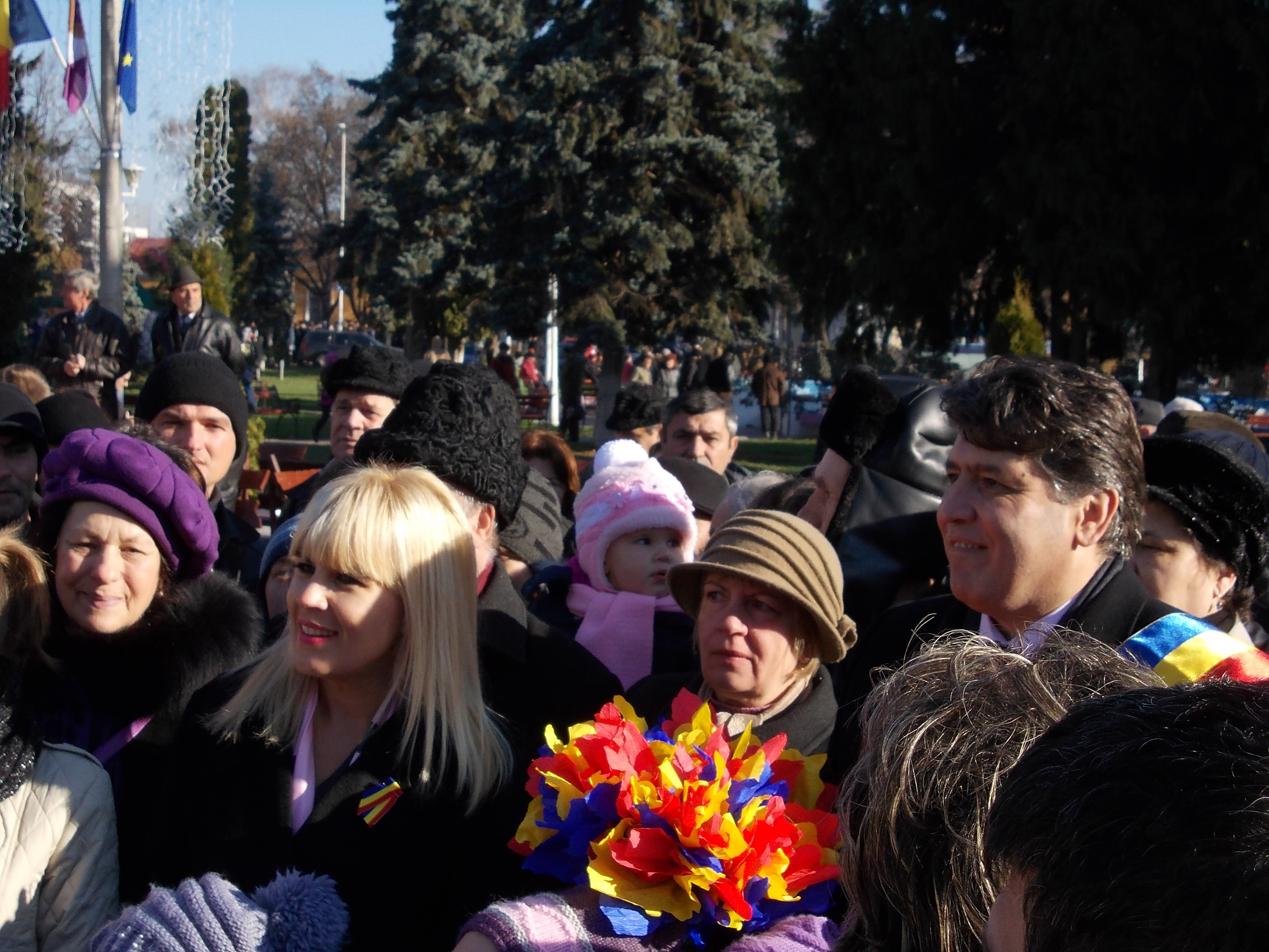 Elena Udrea împreună cu primarul Romanului Laurenţiu Leoreanu